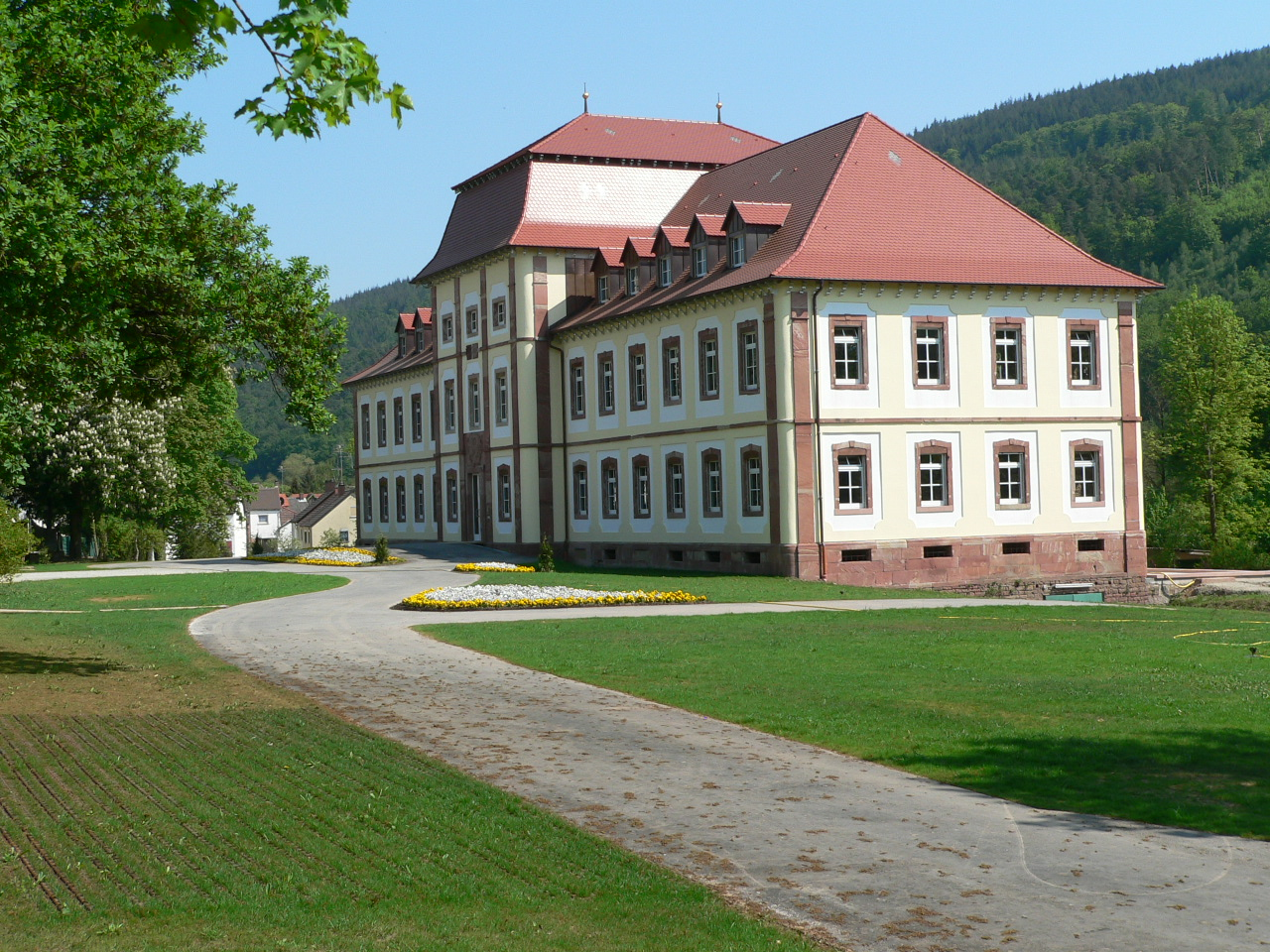 Schloss Fechenbach in Collenberg am Main, Germany